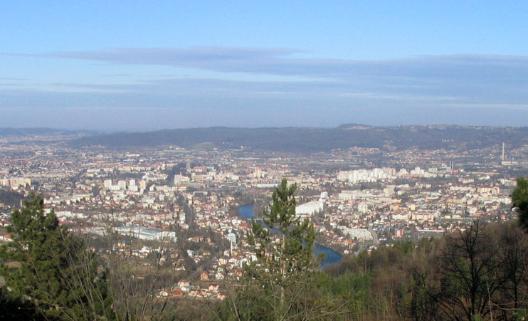 Banja Luka est la capitale de la République serbe de Bosnie